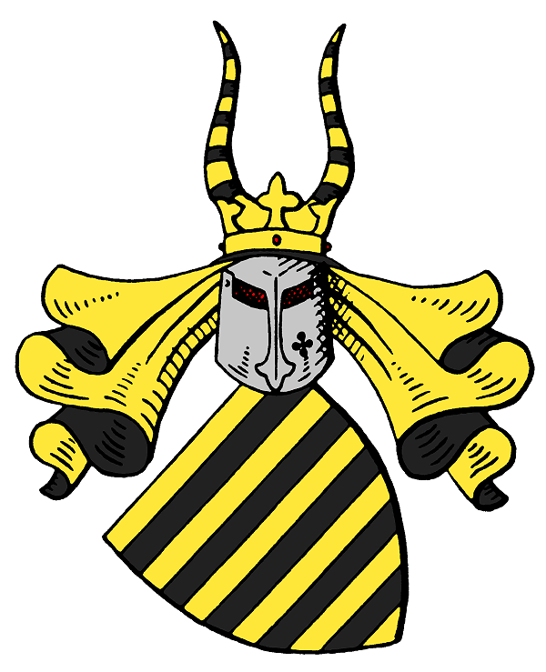 Stammwappen derer von Stryk